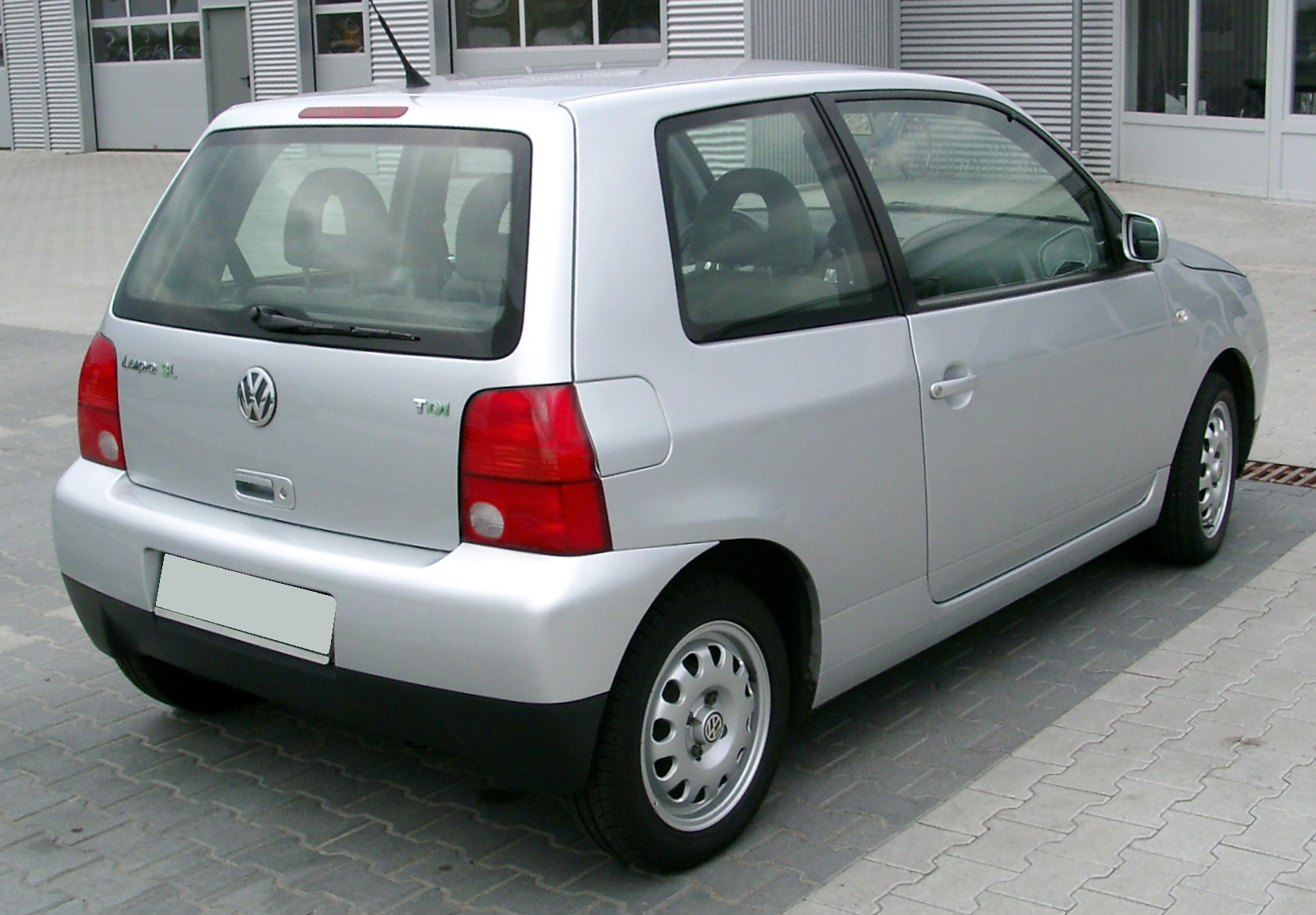 VW Lupo